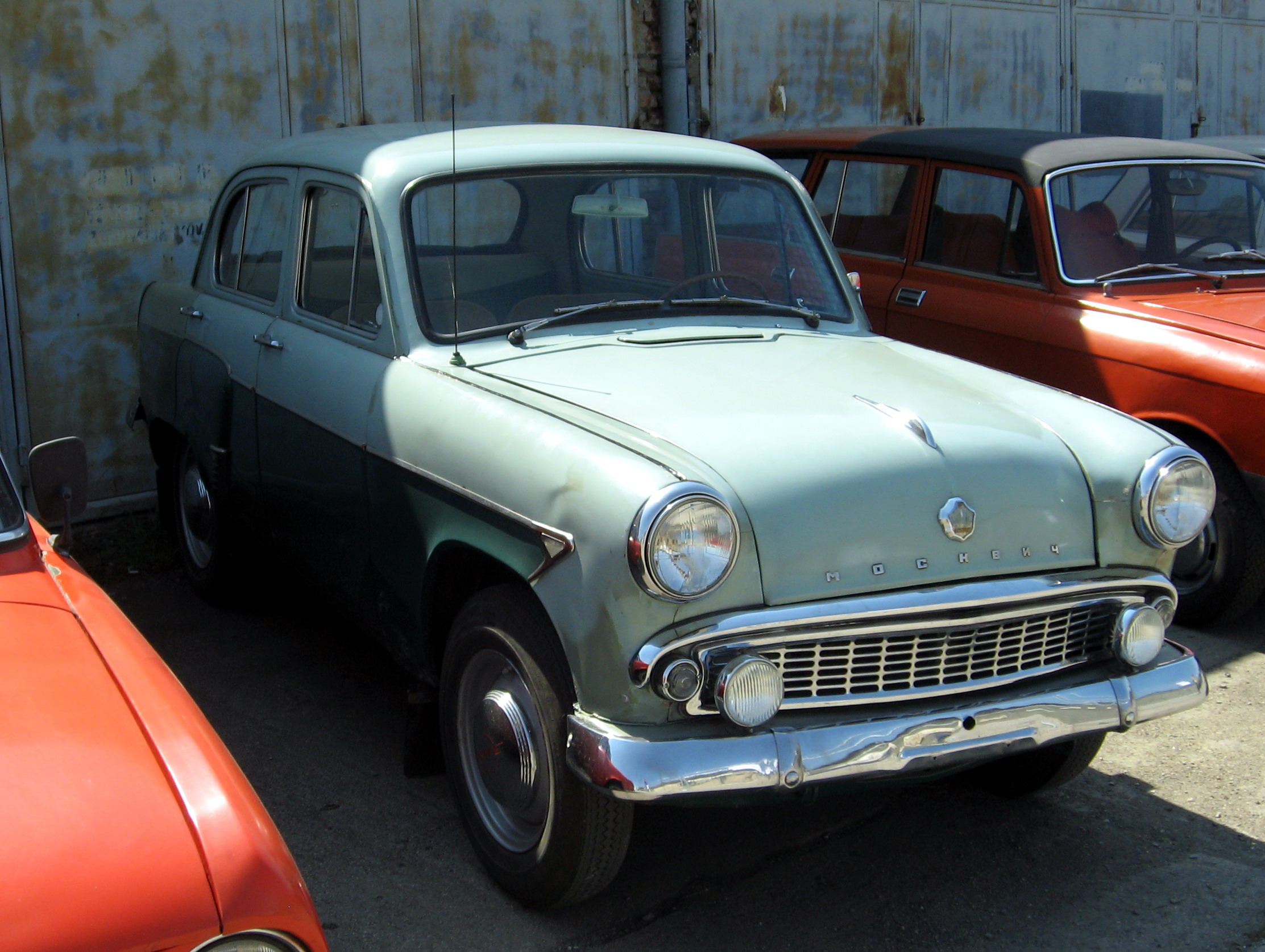 Moskvič